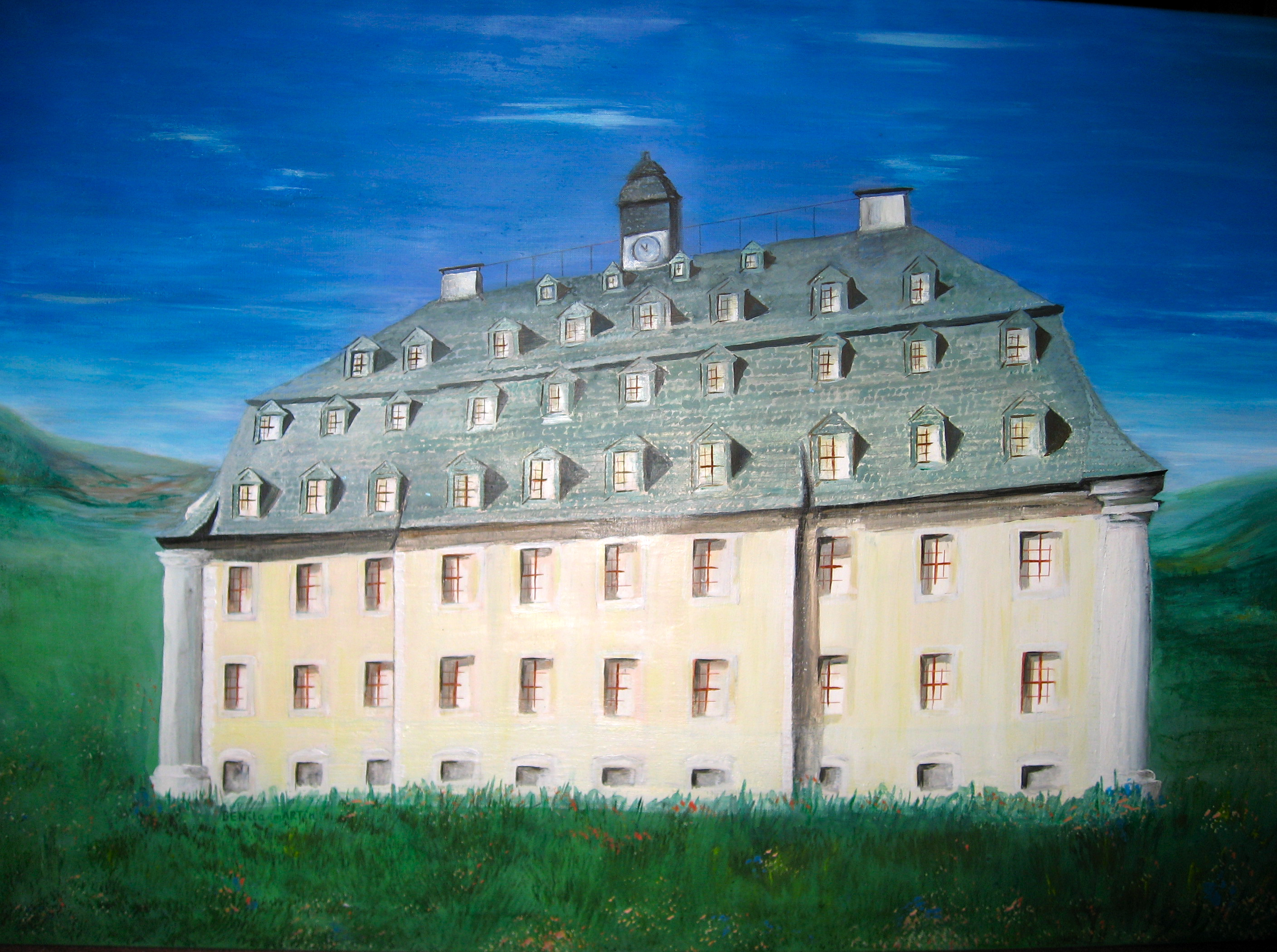 Spinnmühle Lugau, Originalzustand, ADA Dimensionsmalerei®, Dr. Benita Martin, Benetismus